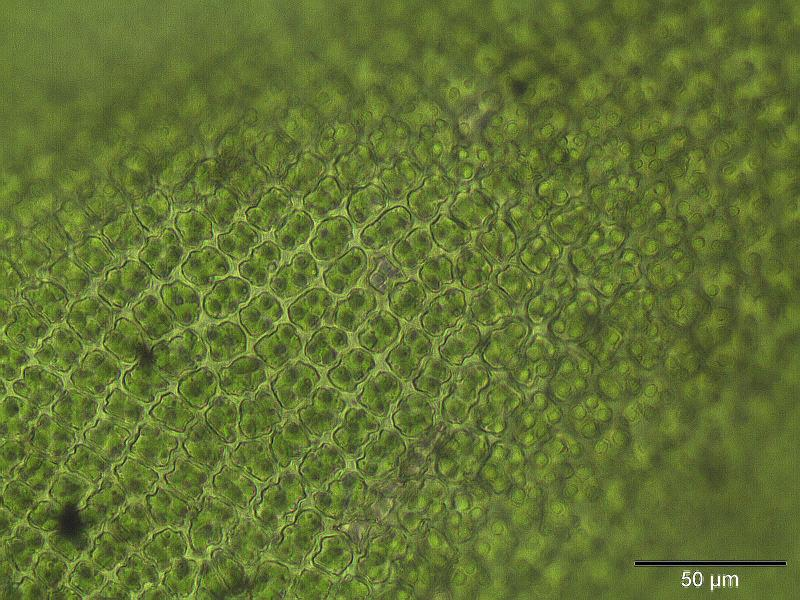 Graue Zackenmütze (Racomitrium canescens), Laminazellen mit stacheldrahtartig verdickten Zellwänden (400x)